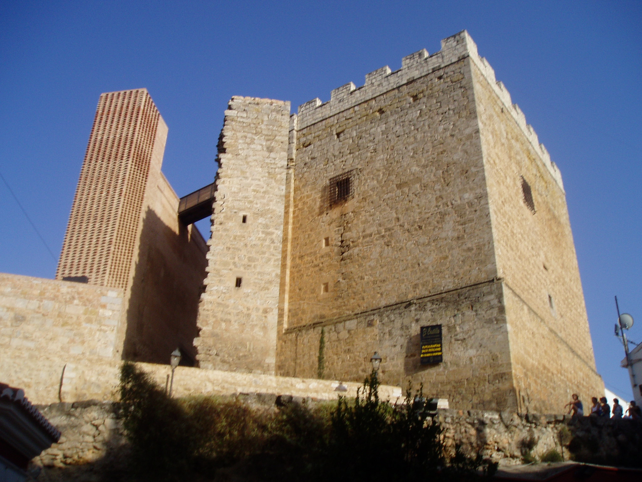 Castillo de Requena, en Valencia.